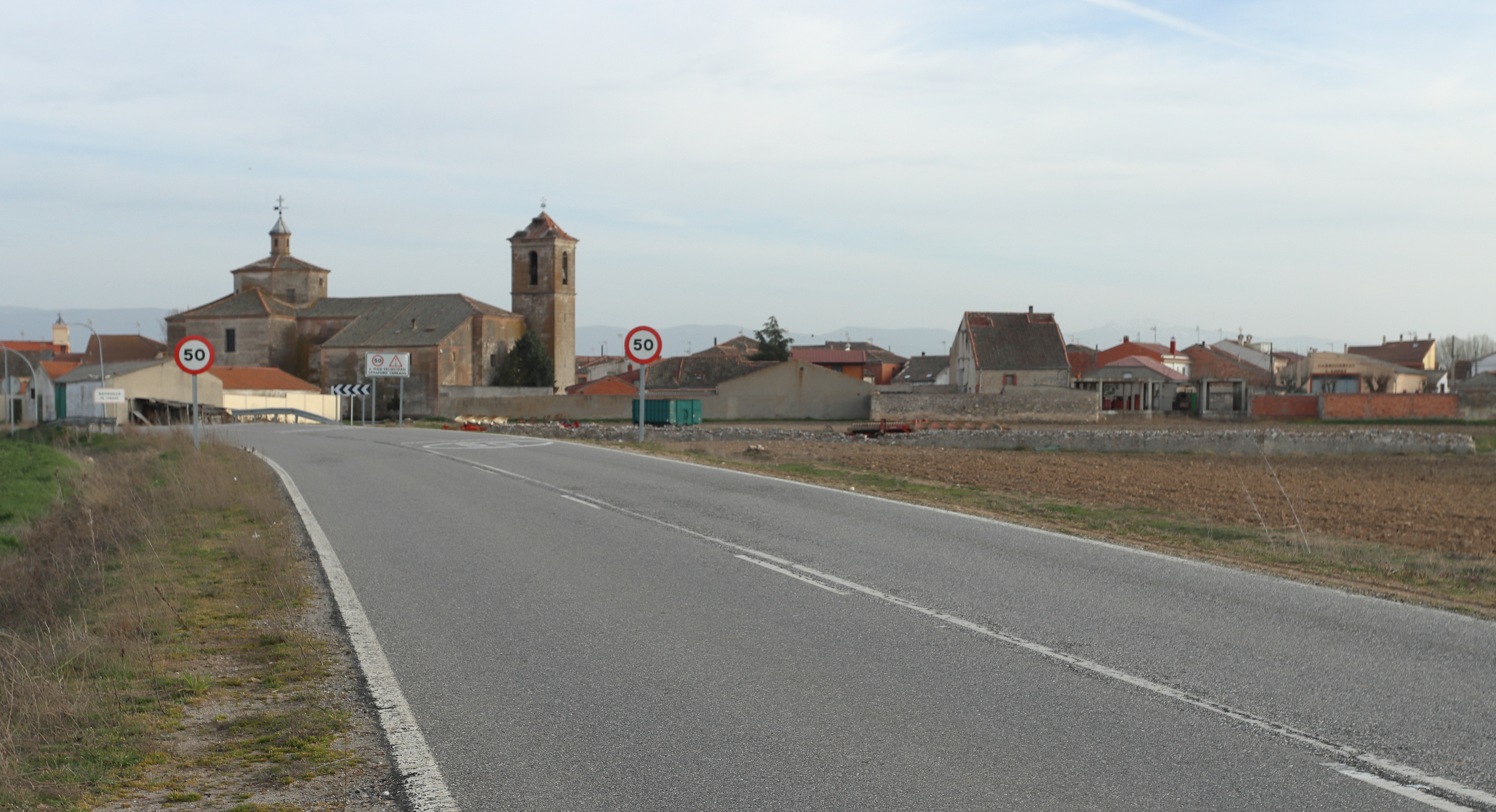 Sauquillo de Cabezas, vista de población desde SG-222